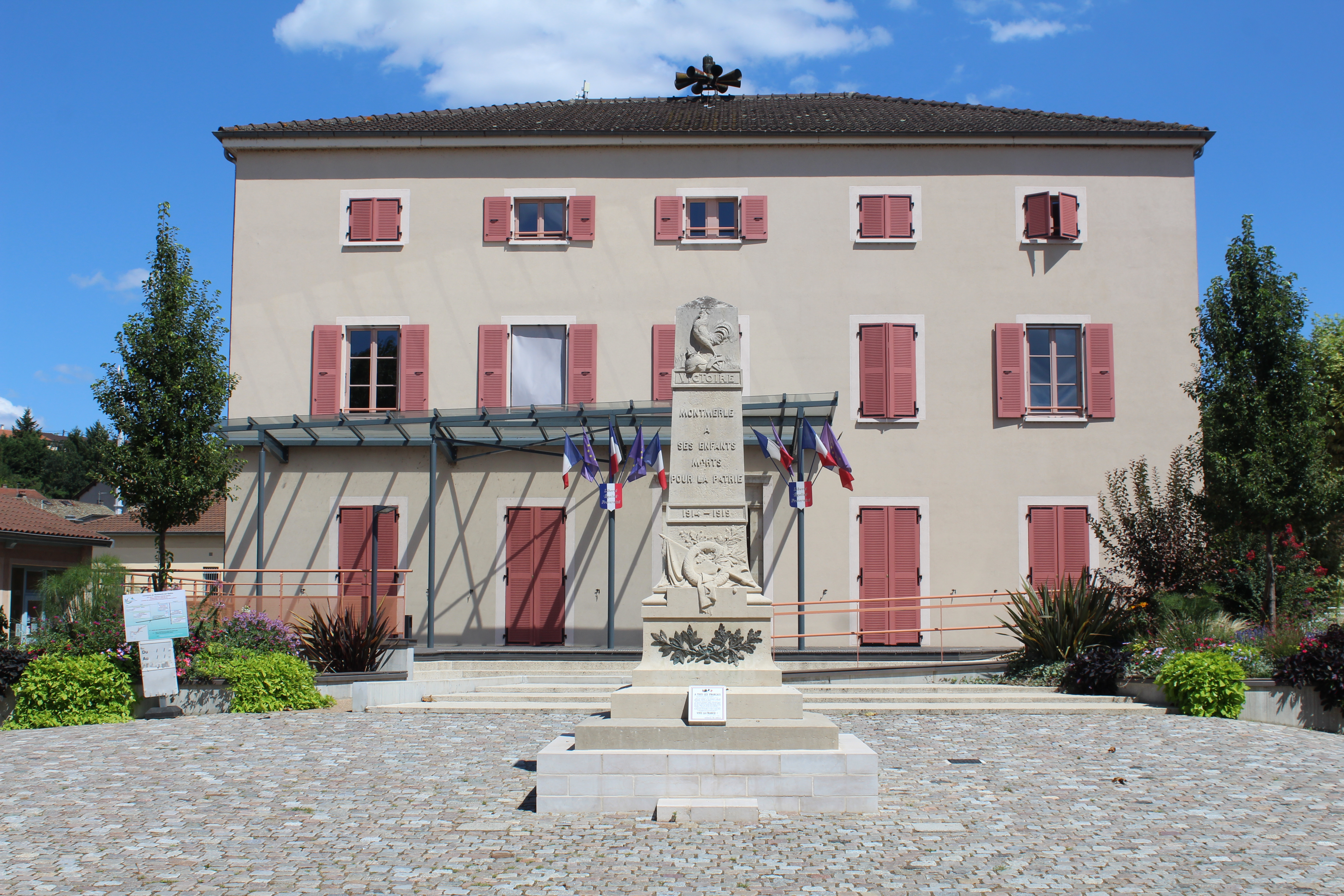 Mairie de Montmerle-sur-Saône.